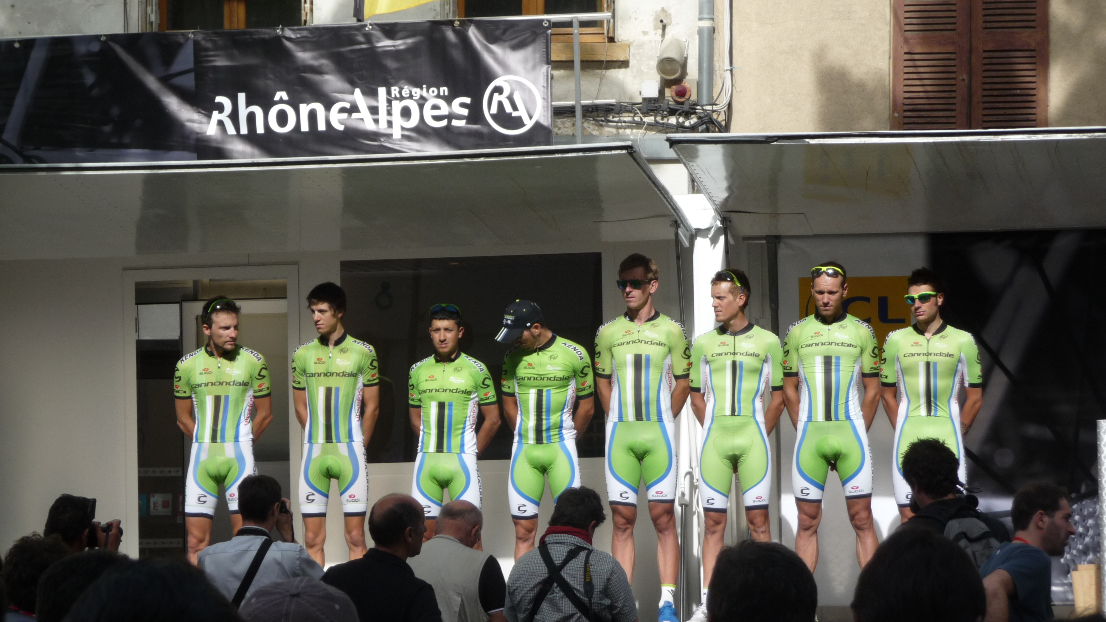 Présentation des équipes du Critérium du Dauphiné 2014 lors du départ de la 2ème étape à Tarare.